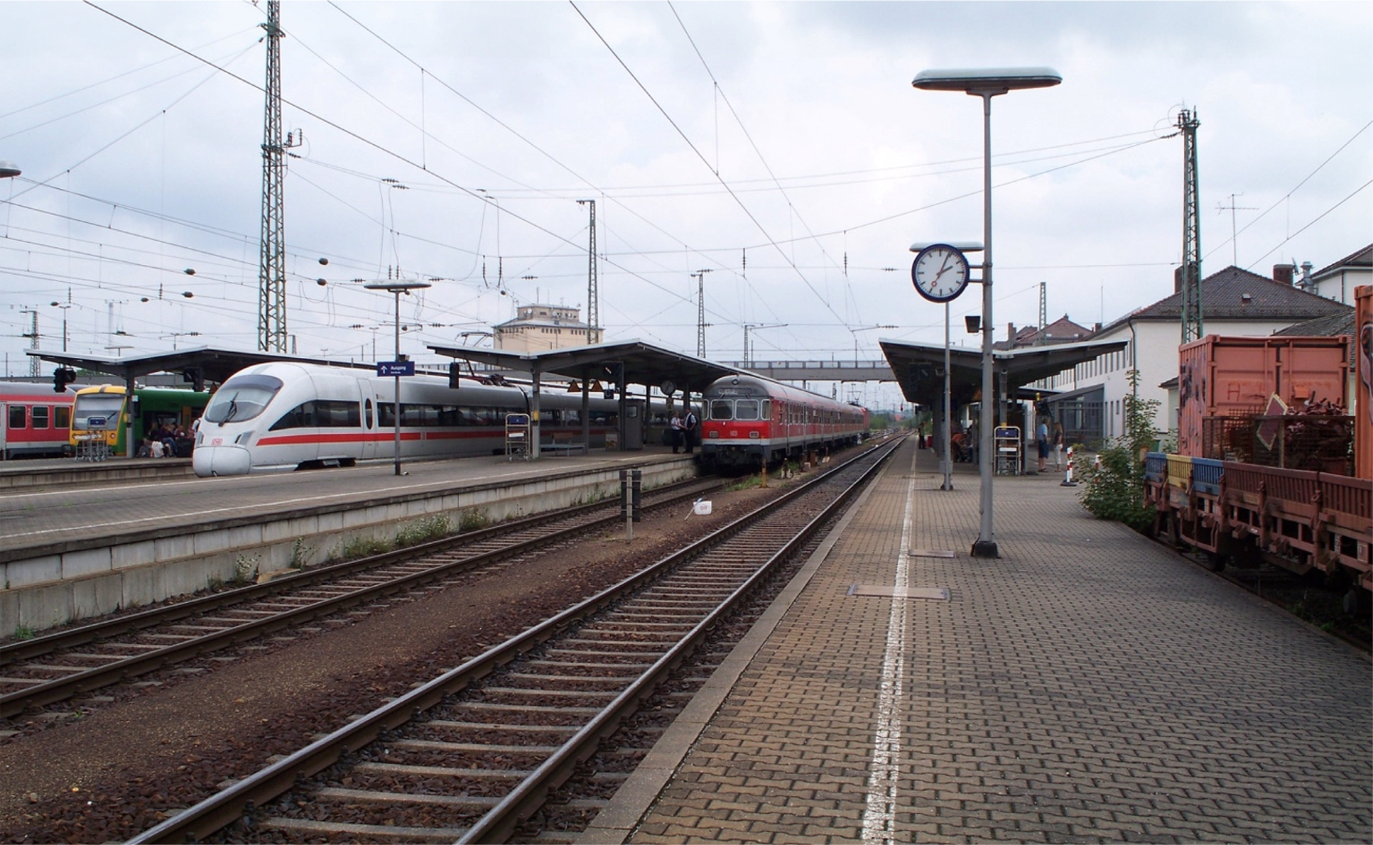 Bahnsteige des Bahnhofs Plattling.